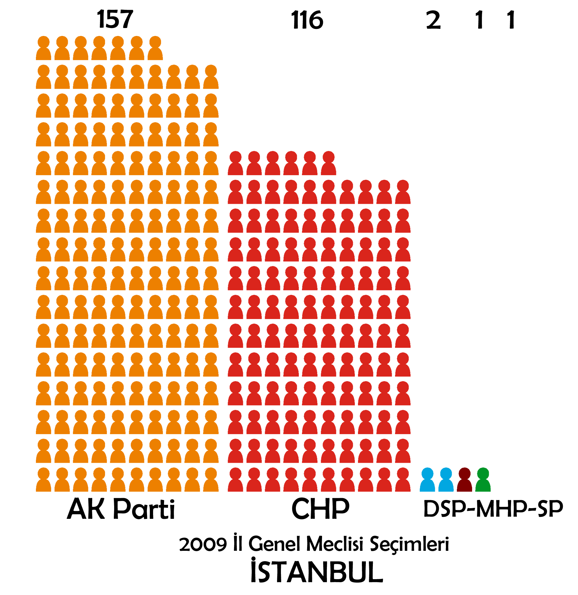 2009 Türkiye yerel seçimleri